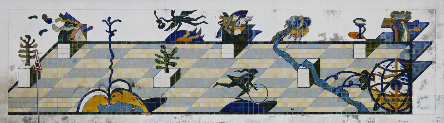 Querubim Lapa, Painel de azulejos, 1994, Avenida 24 de Julho, Lisboa